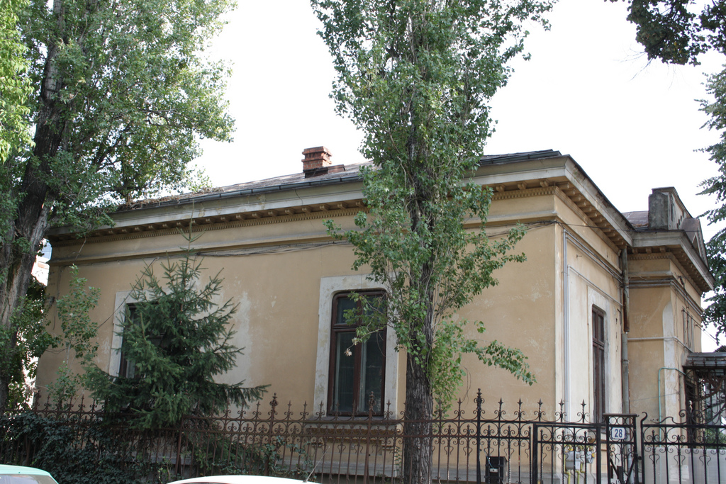 Casă, Str. Sevastopol 28 sector 1